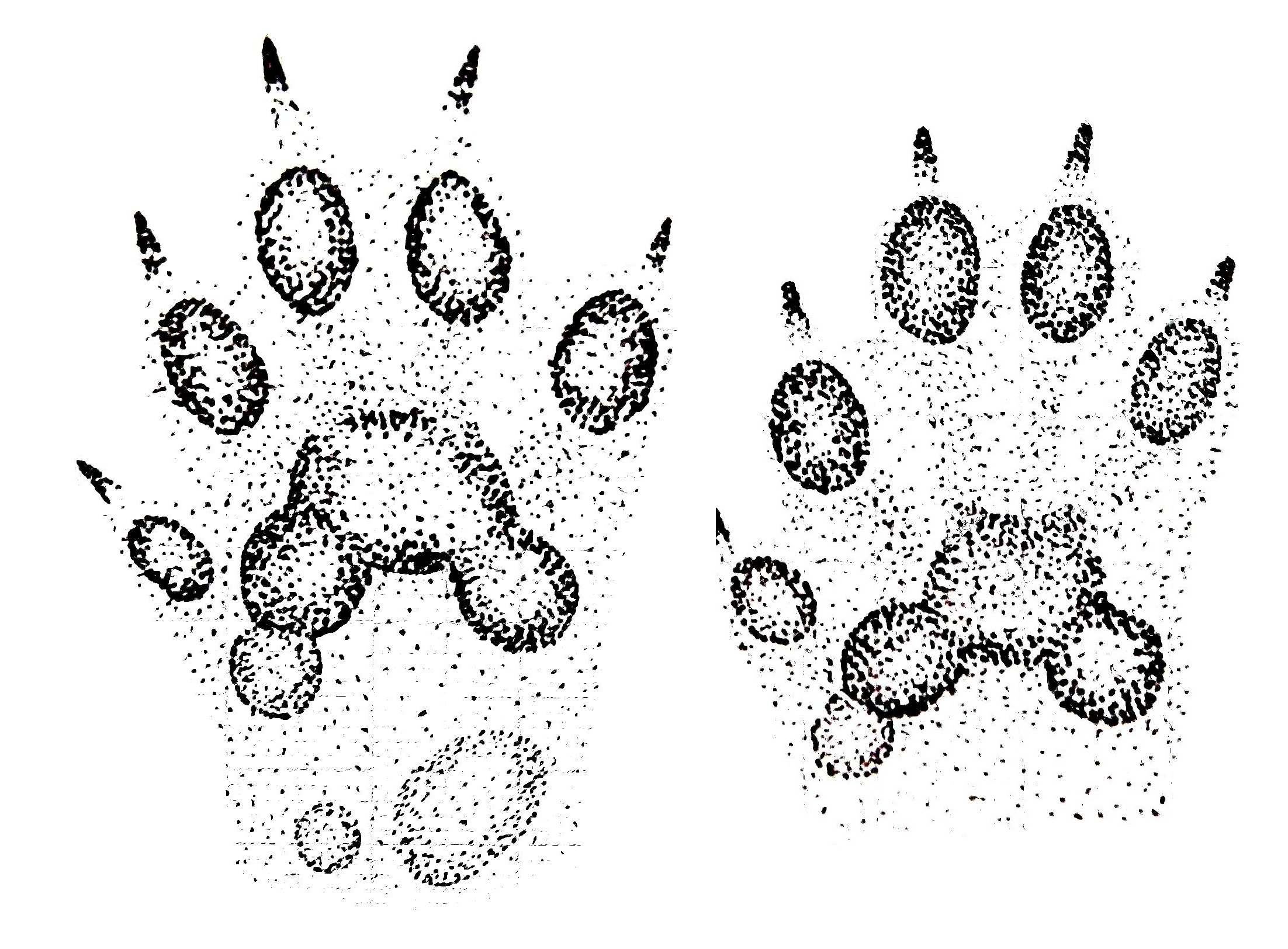 Huella delantera derecha y trasera derecha de garduña (Martes foina)